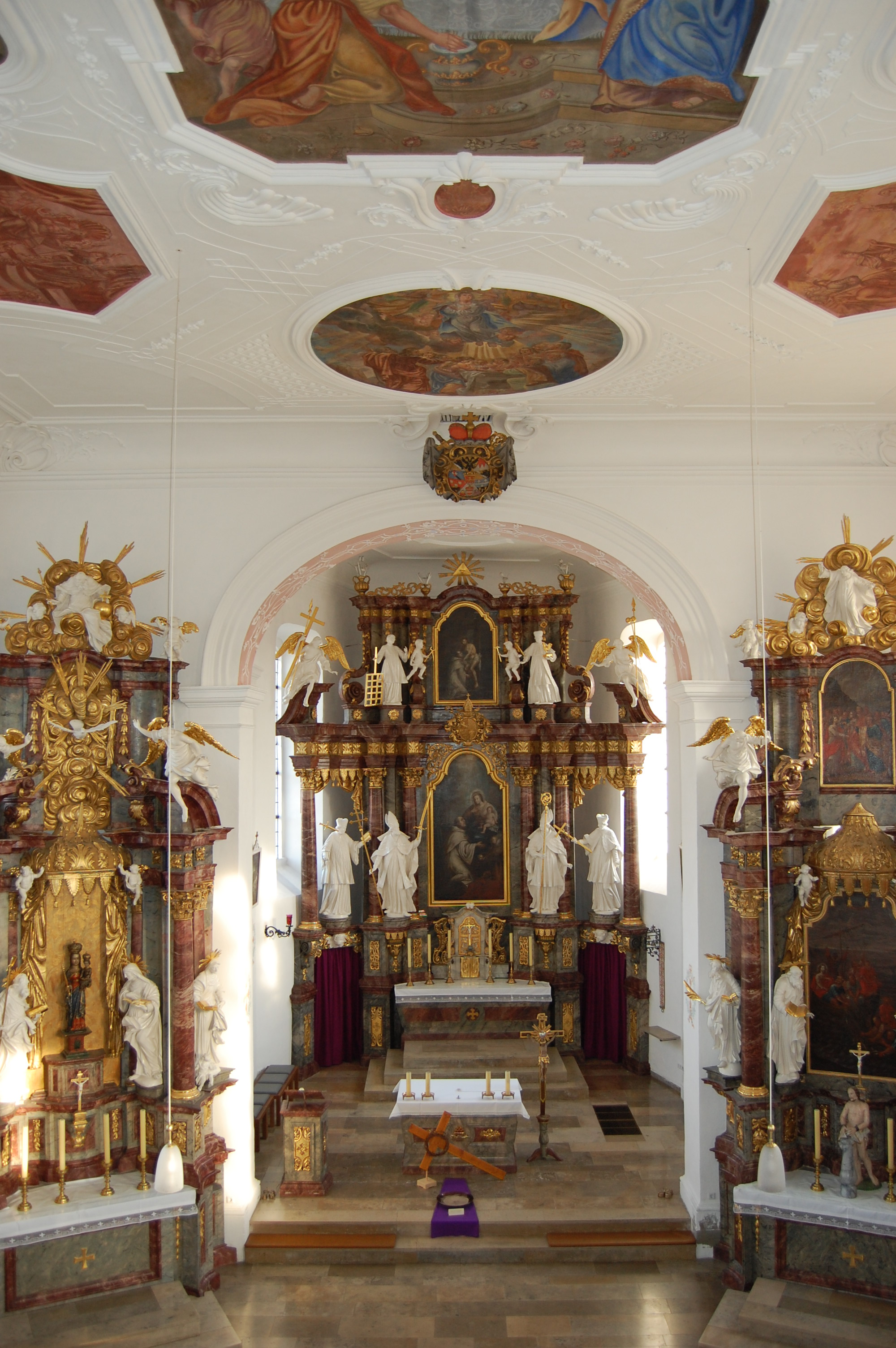 Innenansicht Kirche Mariä Himmelfahrt, Fridritt, Stadt Münnerstadt, Kreis Bad Kissingen (2011)